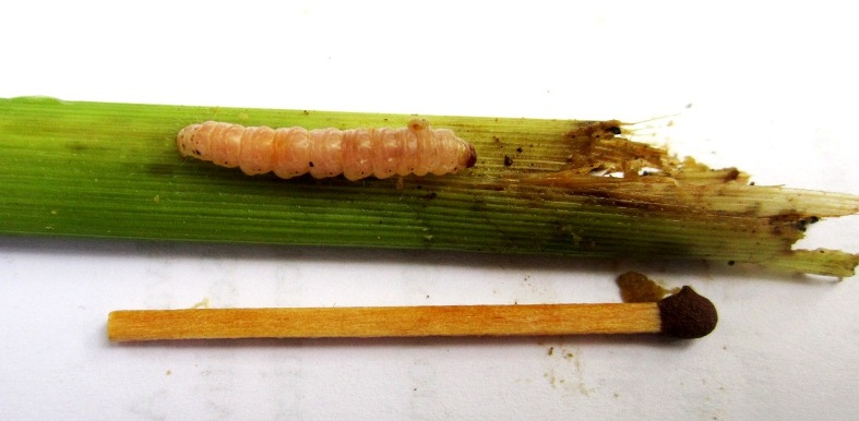 Penggerek batang jagung (O. furnacalis) pada batang jagung usia 5 minggu. Tangkai korek api sebagai pembanding ukuran.